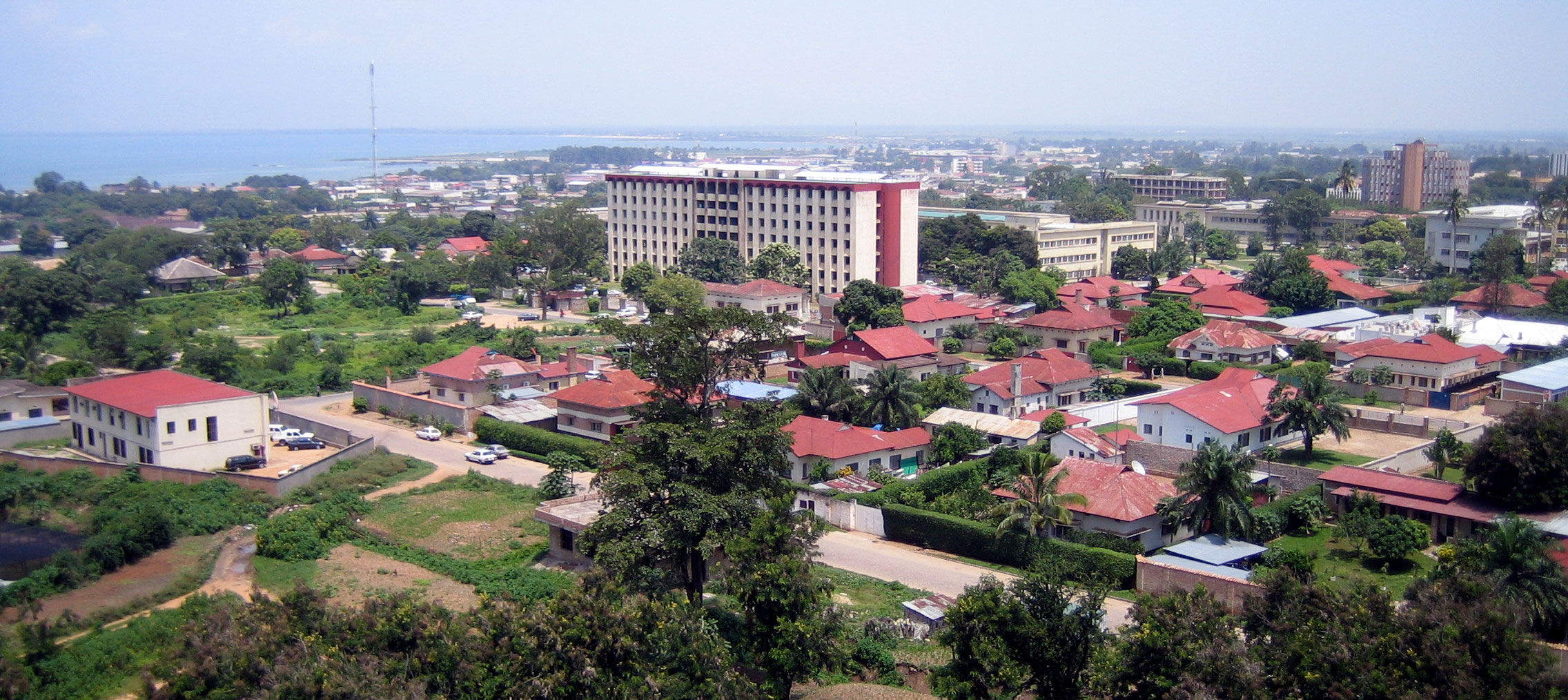 Sujet:Bujumbura vum Kathedralstuerm aus gesinn.